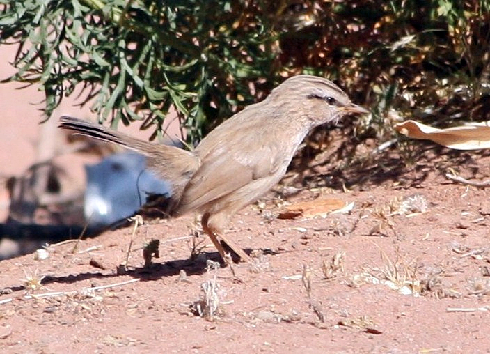 Dromoïque du désert, Petra, Jordan